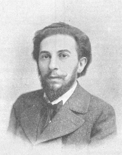 Edmund Eysler 1874-1949, österreichischer Komponist Austrian composer.